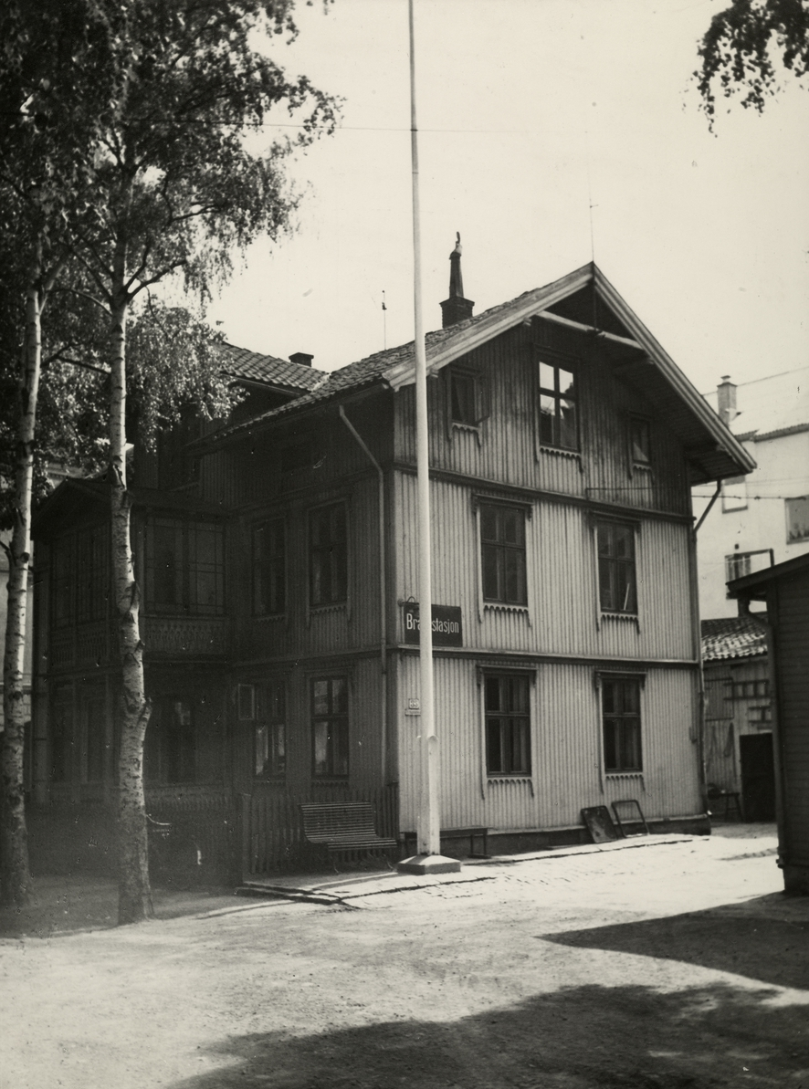 Hegdehaugen brannstasjon stod omtrent der boligblokken i Bogstadveien 33 er nå. Ukjent fotograf, ca. 1940–45. Fra Byhistorisk samling hos Oslo Museum.